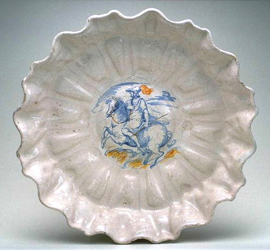 Crespina decorata con cavaliere. Faenza, Virgiliotto Calamelli fine del XVI secolo